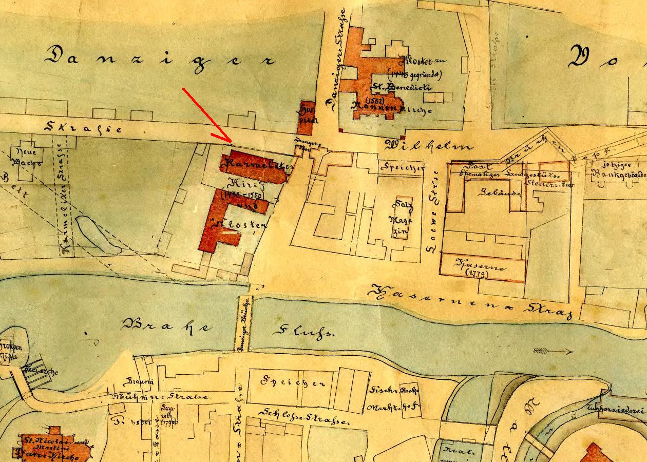 Lageplan der Stadt und Burg Bromberg (Bydgoszcz) mit ihren im 16, 17 und 18 Jahrhundert vorhandenen Bauanlagen. Nach alten Karten, den noch heute erhaltenen Ueberresten der Bauwerke und örtlichen Ermittelungen angefertigt für den hiesigen historischen Verein im Jahre 1890. Lokalizacja kościoła karmelitów.